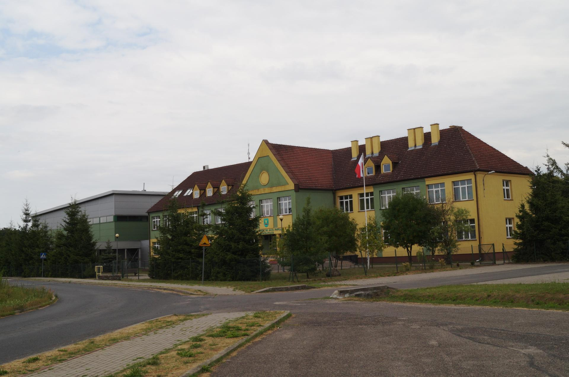 Szkoła Podstawowa w Różankach